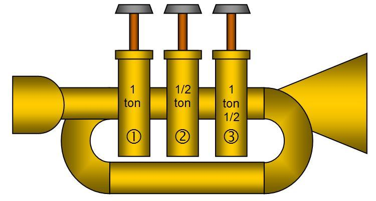 Les 3 pistons d'un instrument à pistons. Leur repérage et leur effet. schéma personnel réalisé sous word Catégorie:Instrument à vent, cuivres